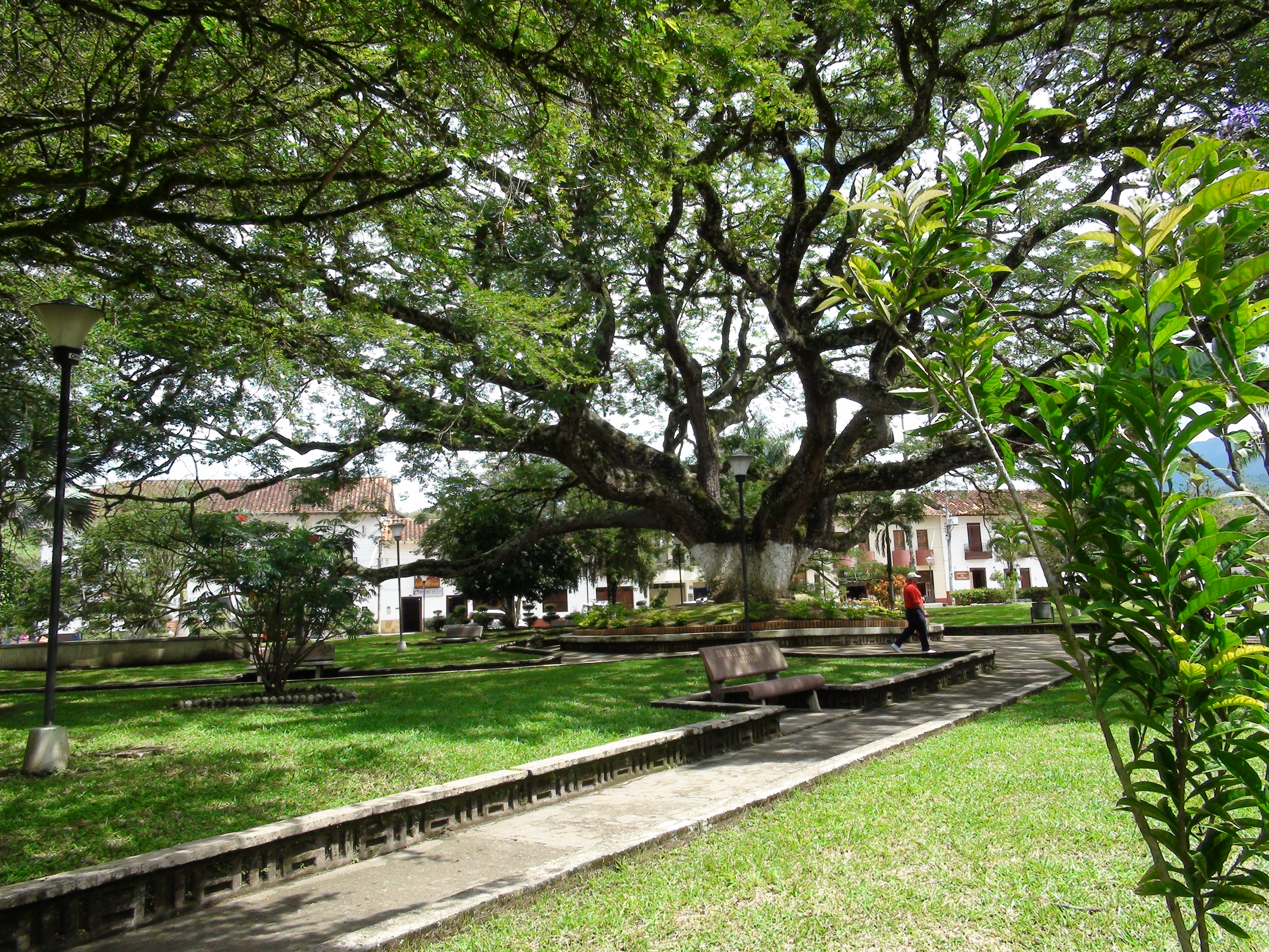 Ahí viene el Samán con sus brazos sabios a recordar la pequeña y efímera especie humana.